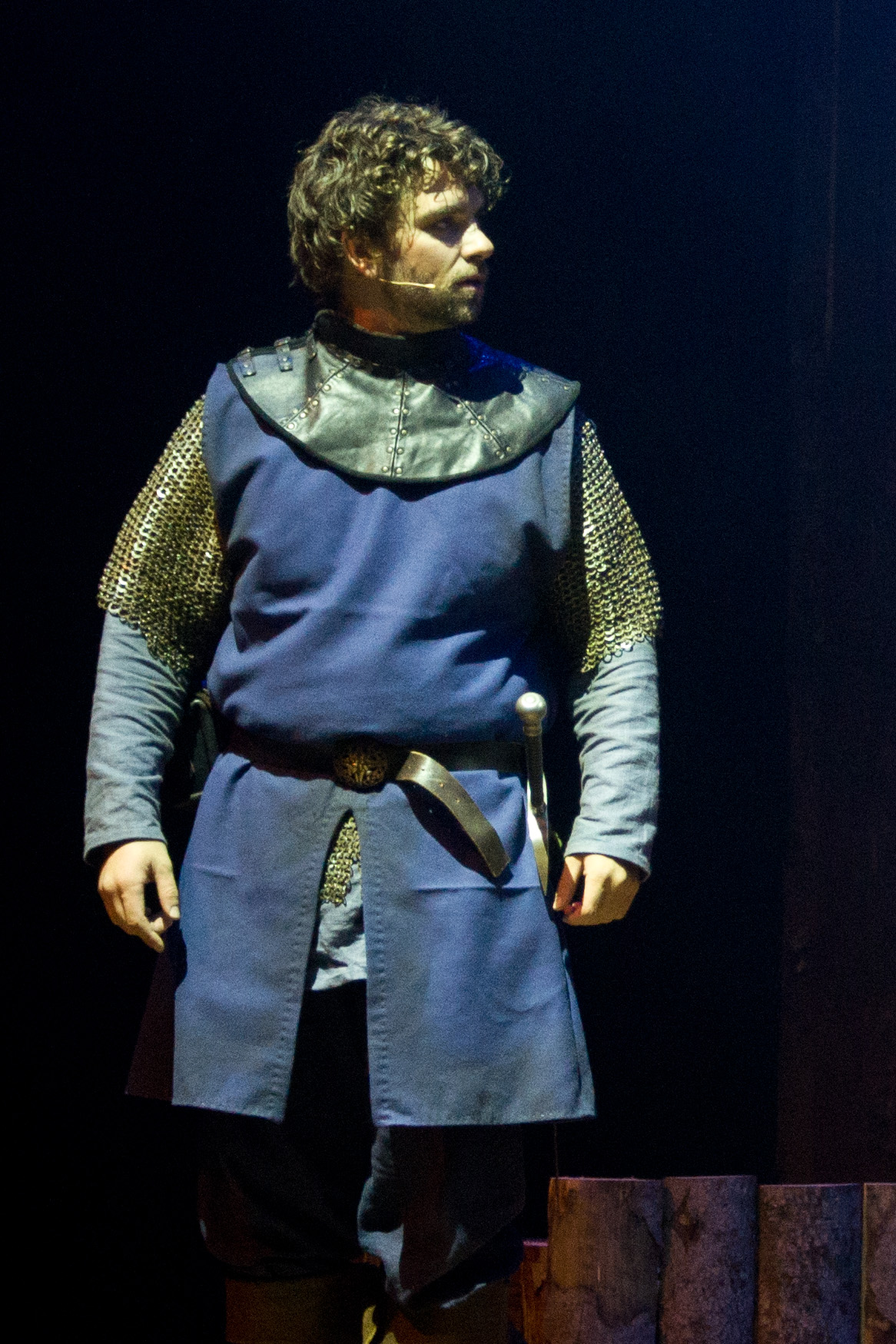 Anders Gjønnes, norsk skuespiller. Fotografert under musikalen «Håkon Håkonsson - Kampen om tronen» i Tønsberg 2014.